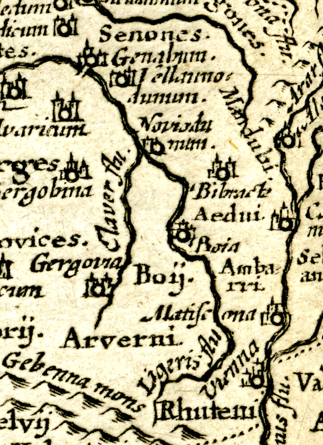 Carte DBG (1675) centre Scaligeri Image scannée par Jean de la Garde.